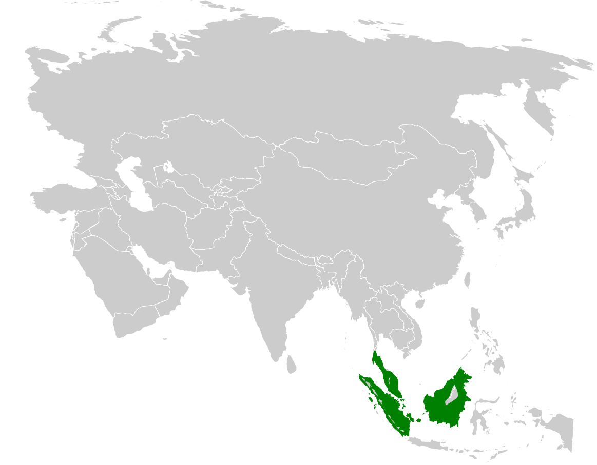 Pycnonotus erythropthalmos distribution map, based on